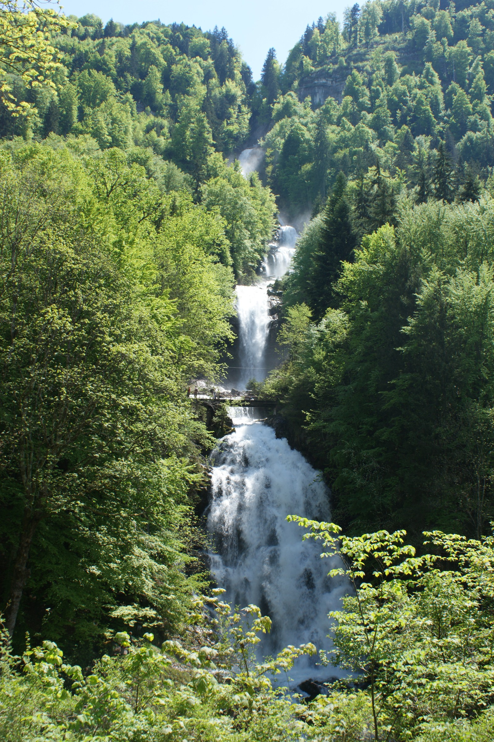 Die Giessbachfälle im Berner Oberland